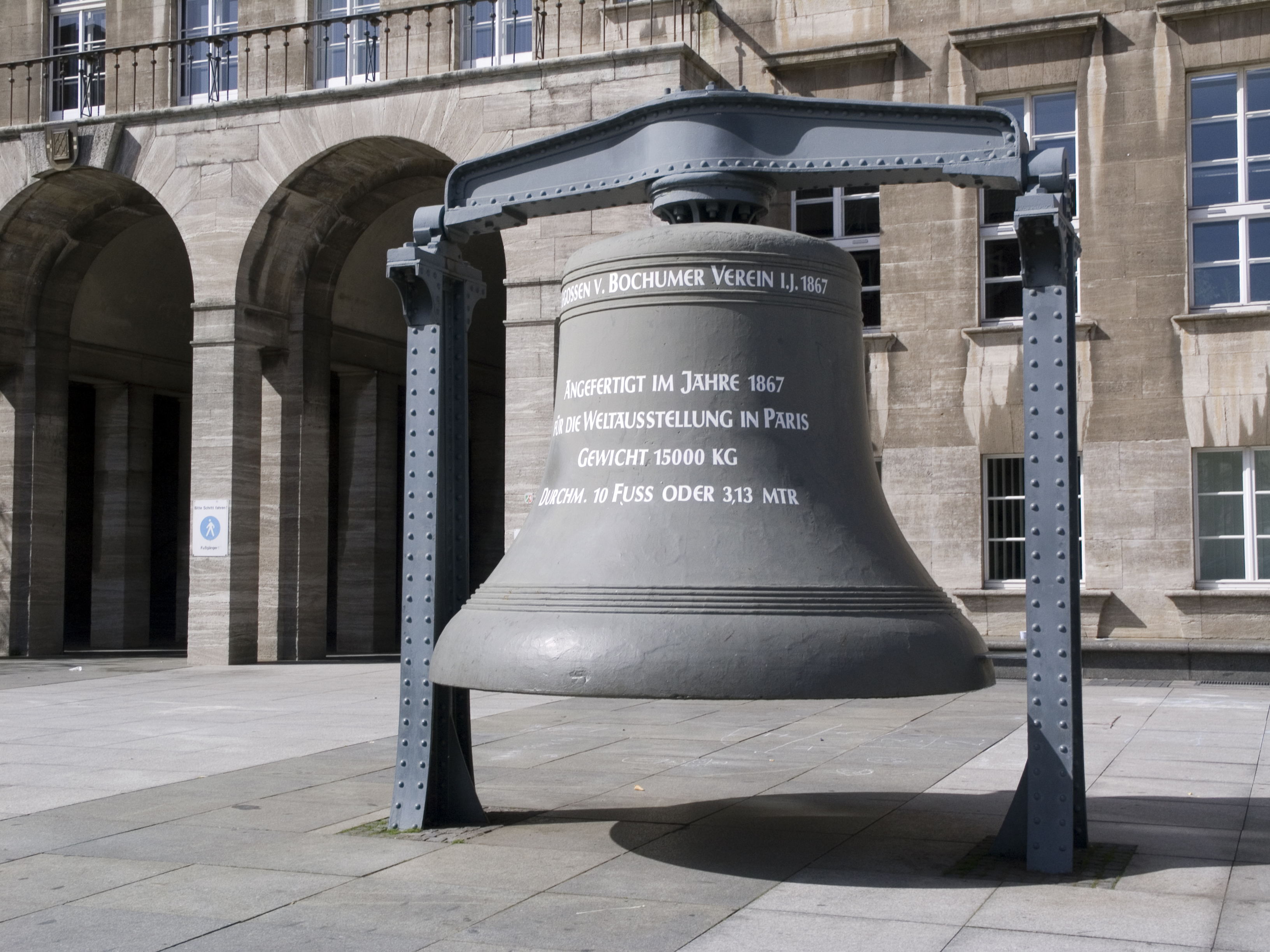 Северный Рейн - Вестфалия, Бохум. Городская ратуша, Бохумский колокол